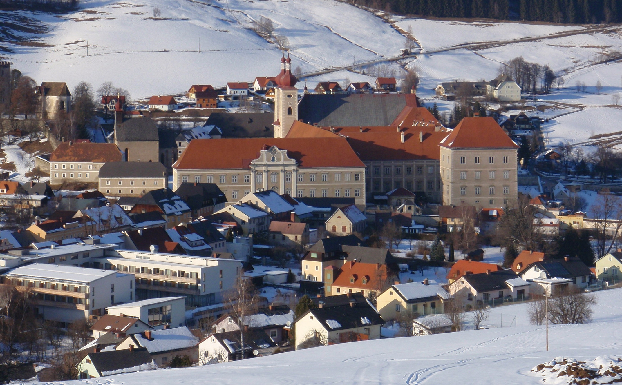 Benediktinerstift St. Lambrecht im Winter